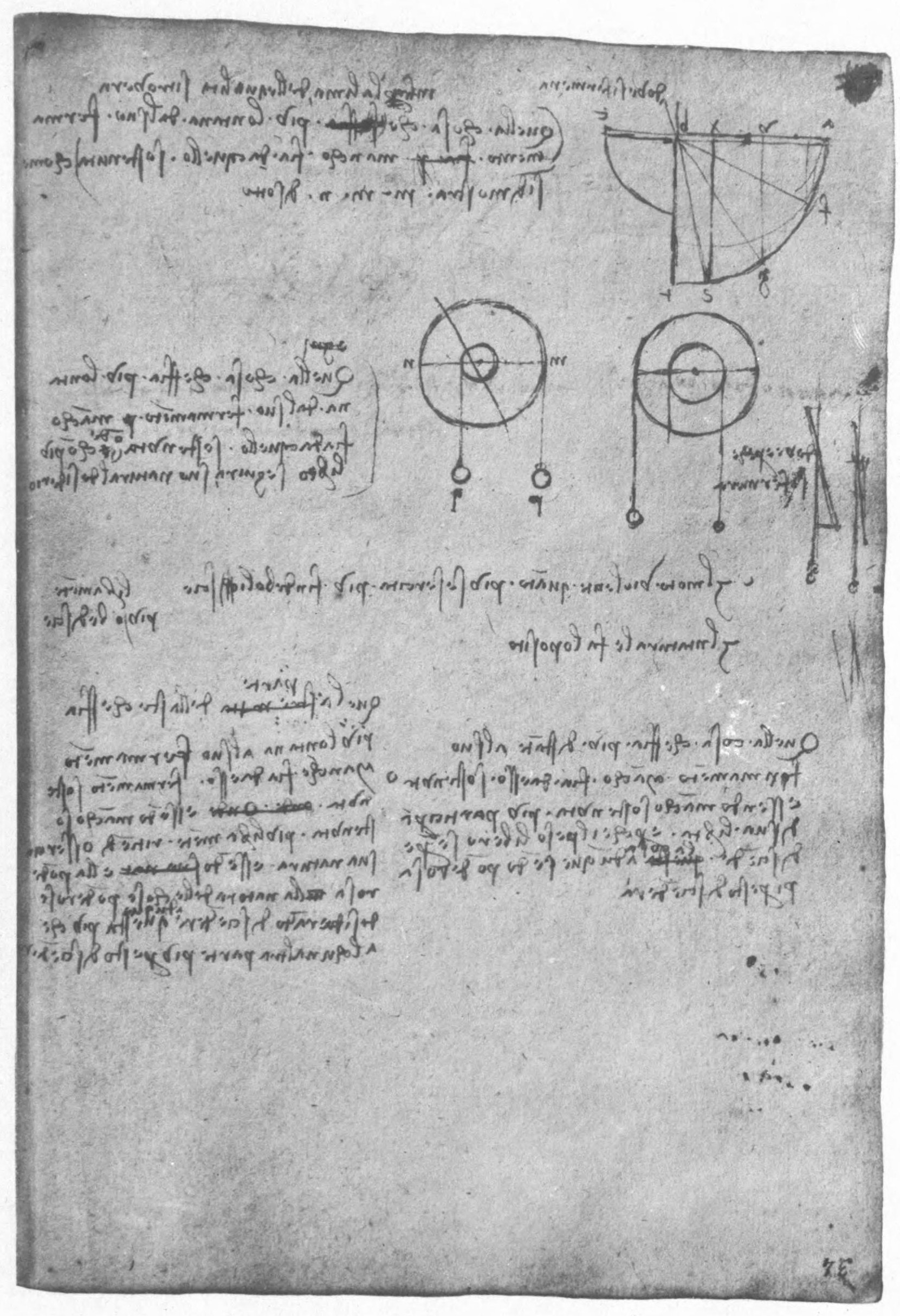 Codice Trivulziano, c. 26r